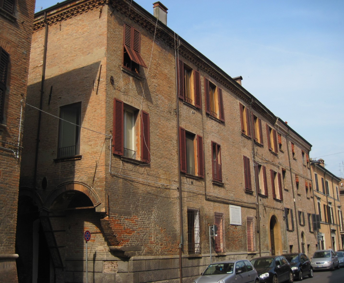 casa Giovanni Boldini in via Savonarola a Ferrara